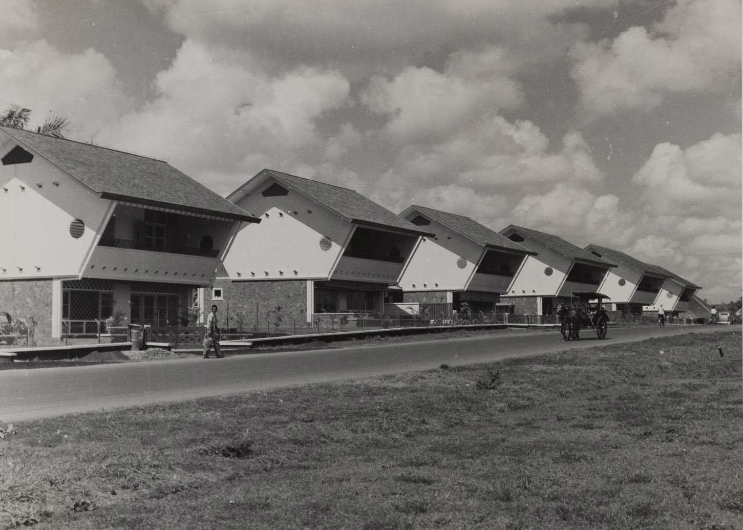 Title: Woningen van de staf van de Shell/Bataafsche Petroleum Maatschappij in de wijk Kebajoran te Djakarta Image code: 52654 Keywords: BPM, houses, Indonesia, Jakarta Raya, petroleum industry Albumnumber: 611 Date: Circa 1955 Object type: Foto Collection: Bal, F.H.J. Provenance: Bal, F.H.J. Provenance type: Schenking Acquisition date: 1999-12-22 Size: 17x23,5cm